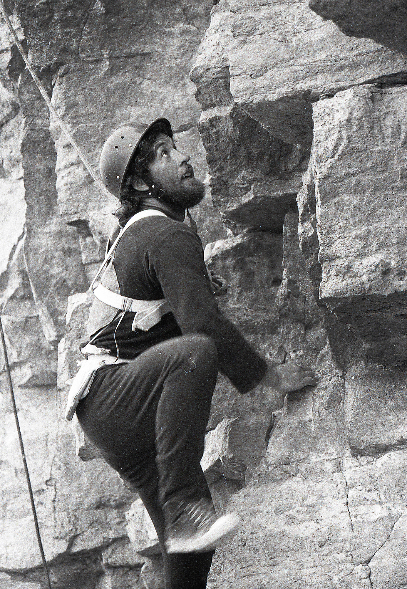 Tõnu Tennisson Mustjala pangal.